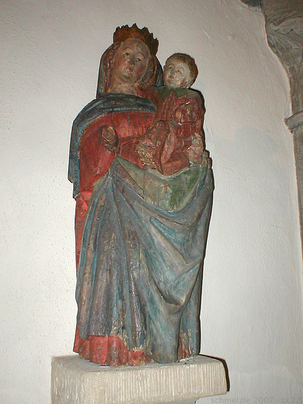 „Heilbronner Madonna“ in der romanischen Turmchorkapelle des Deutschordensmünsters in Heilbronn